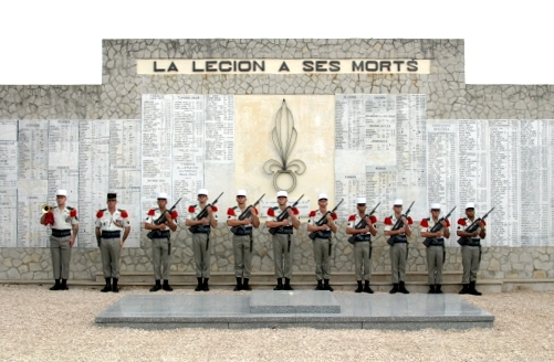 Piquet d'honneur du 2e REP devant le monument aux morts de Puyloubier.